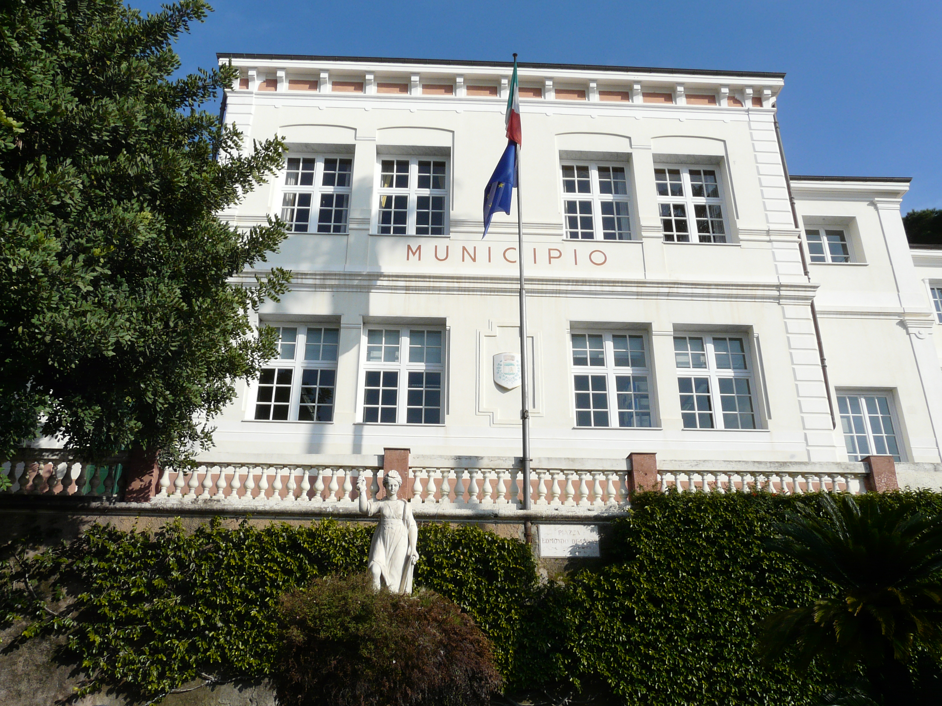 Municipio di Bordighera, Liguria, Italia